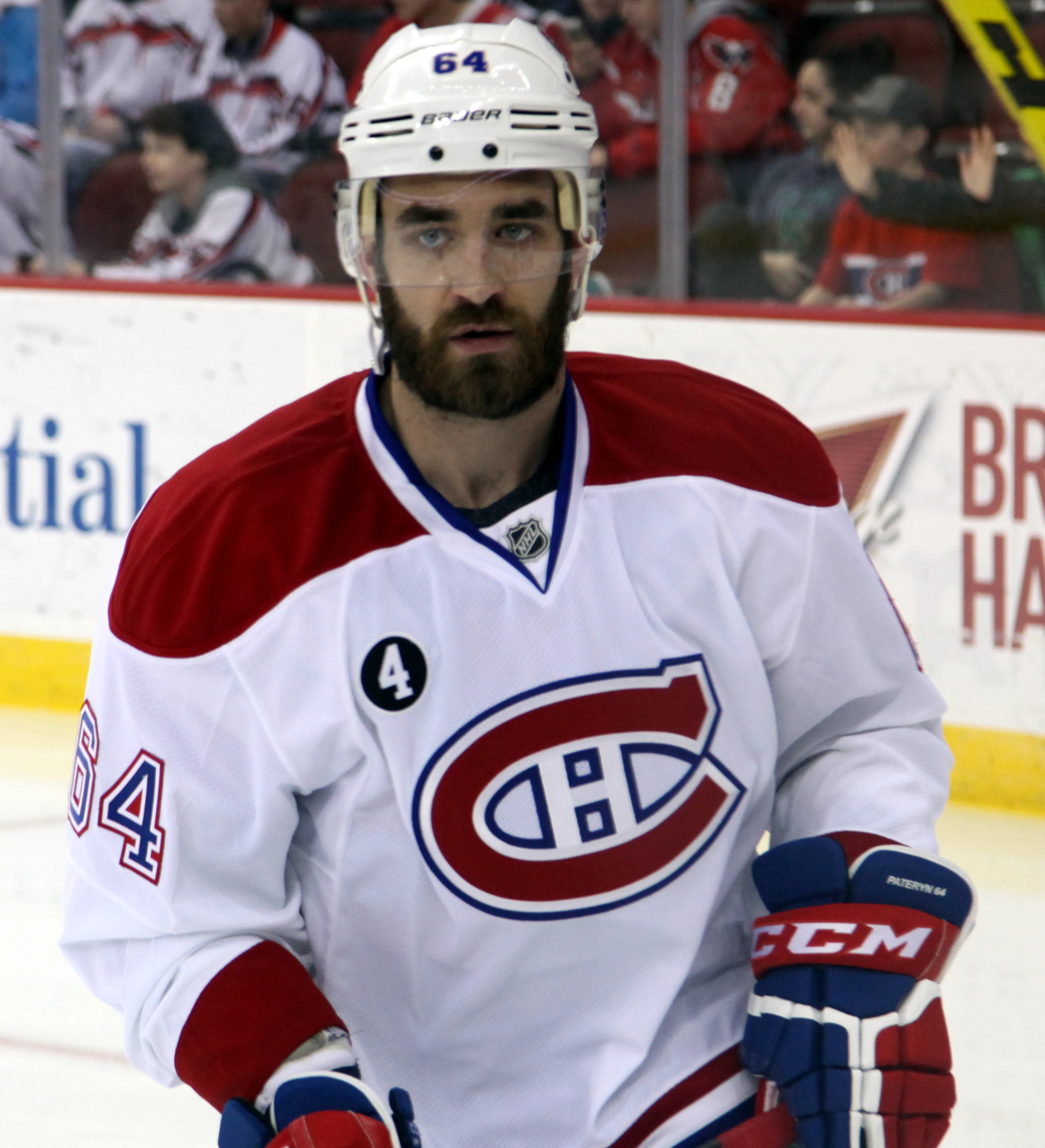 Greg Pateryn in April 2015.